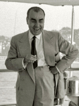 Título original: Franco y sus nietos en el Azor (2/4) Localización: Guipúzcoa